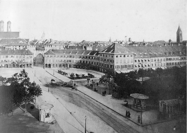 Das Karlstor-Rondell